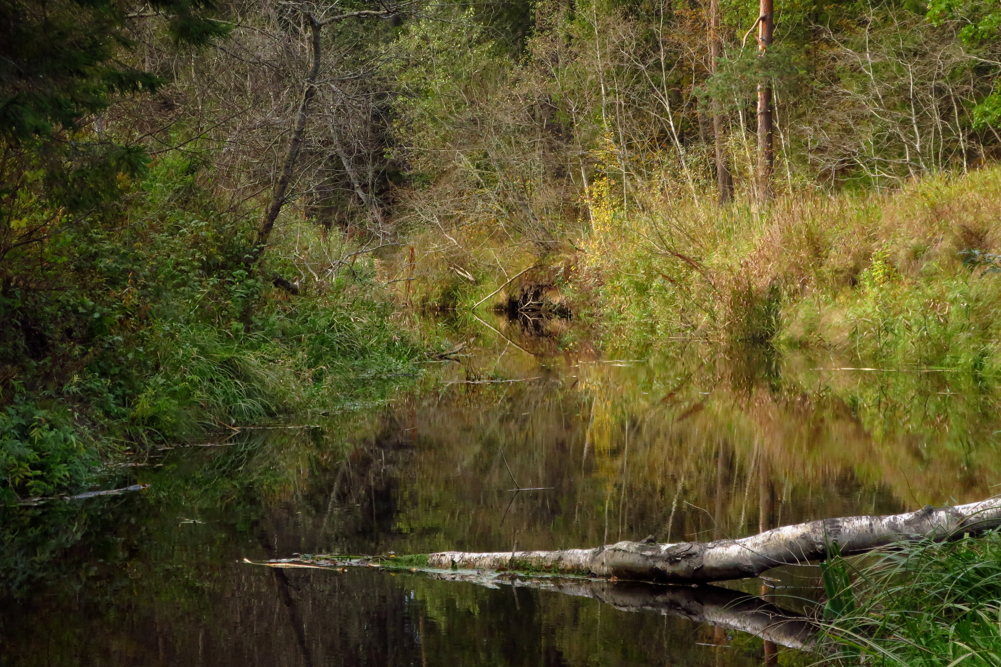 Vääna jõgi Vahi ja Vaila küla vahel